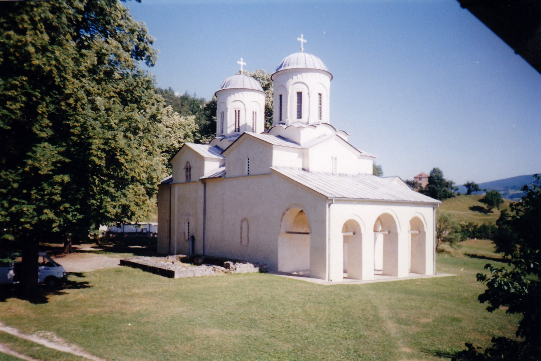 Манастир Бања код Прибоја на реци Лим један је од најстаријих у Рашкој области. Током, скоро десет векова постојања, овај манастир је једно од најзначајнијих средишта српске духовности. У њему је 1219. године Свети Сава успоставио једну од првих шест епископија осамостаљене Српске Православне Цркве и за првог епископа поставио свог најбољег ученика из Хиландара, Христофора. Овај манастир је био и маузолеј знамените властелинске породице Војиновића, имао је у свом склопу болницу, школу, неколико пута је рушен и обнављан, а у једној од цркава манастирског комплекса пронађена је једна од најзначајнијих ризница црквених предмета на простору Српске Православне Цркве. Манастирски комплекс чине три цркве: св. Николе, Успења пресвете Богородице, св. Илије, два конака и остаци манастирског бедема и куле.